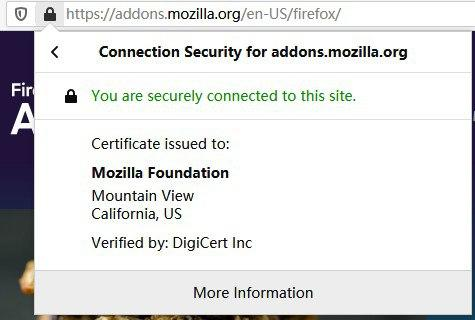 中文（中国大陆）: 使用Firefox访问带有扩展验证证书的Firefox扩展程序网页，检视网站使用的扩展验证证书